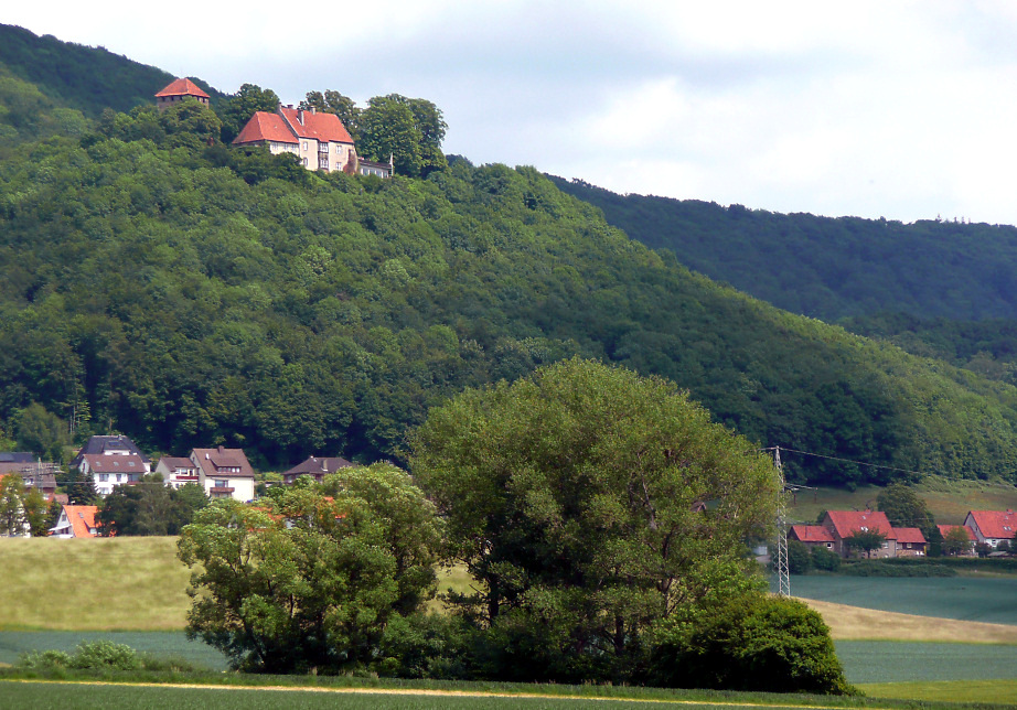 Schaumburg